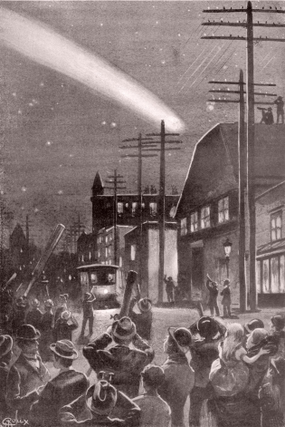 Původní ilustrace G. Rouxe k románu J. Verna